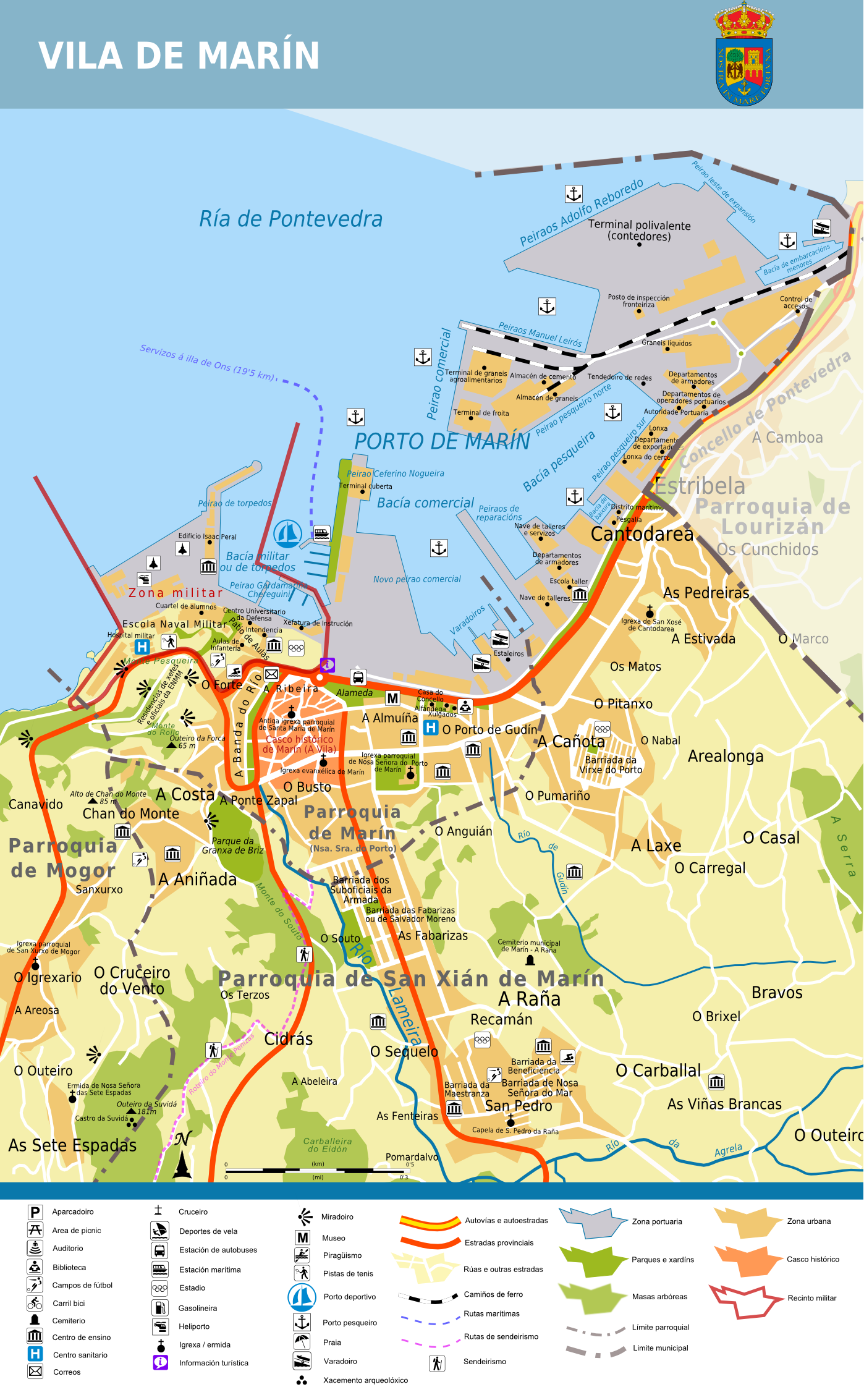 Plano da vila de Marín (O Morrazo, Pontevedra, Galicia, España)